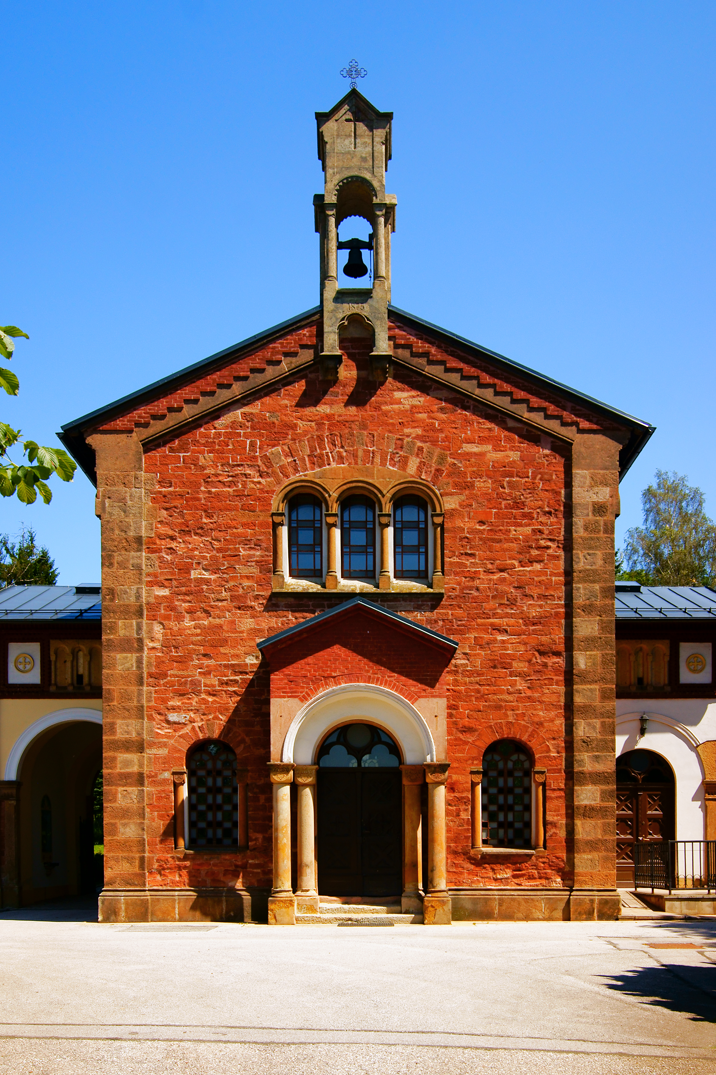 Hřbitov v Trutnově, novorománská kaple.